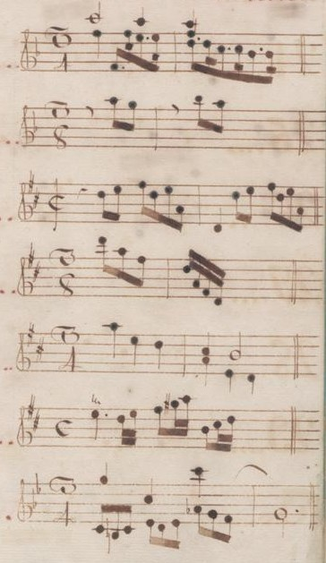 Table du volume VI des manuscrits de Venise (incipit des sonates 1 à 7, K. 296 à 302).